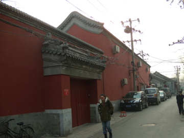 智珠寺北侧